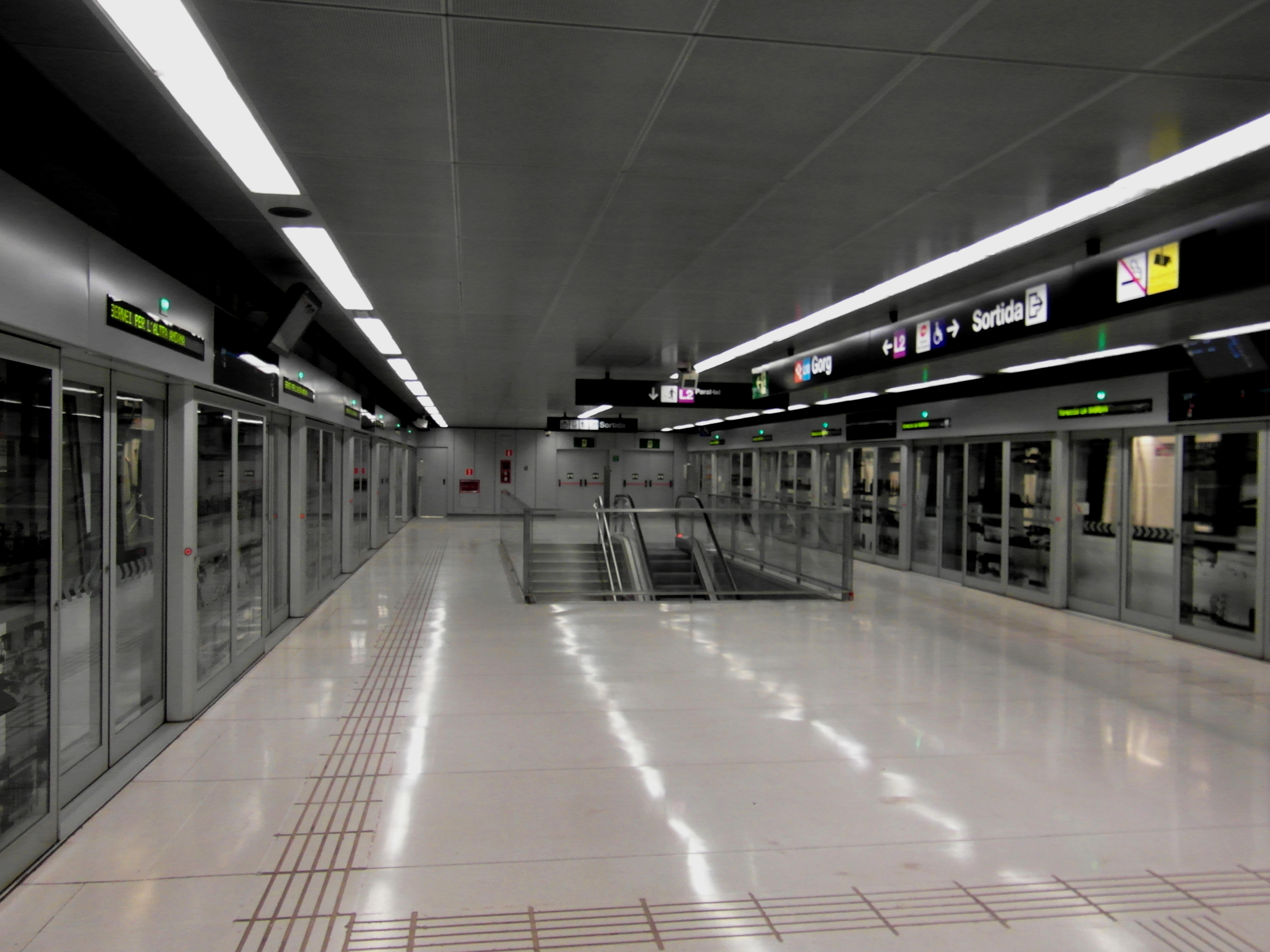 Barcelona - Estació de Gorg